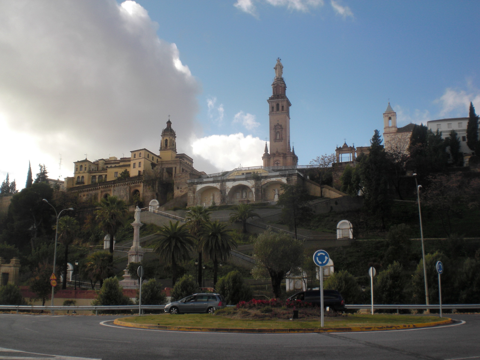 Monumentos de los Sagrados Corazones de San Juan